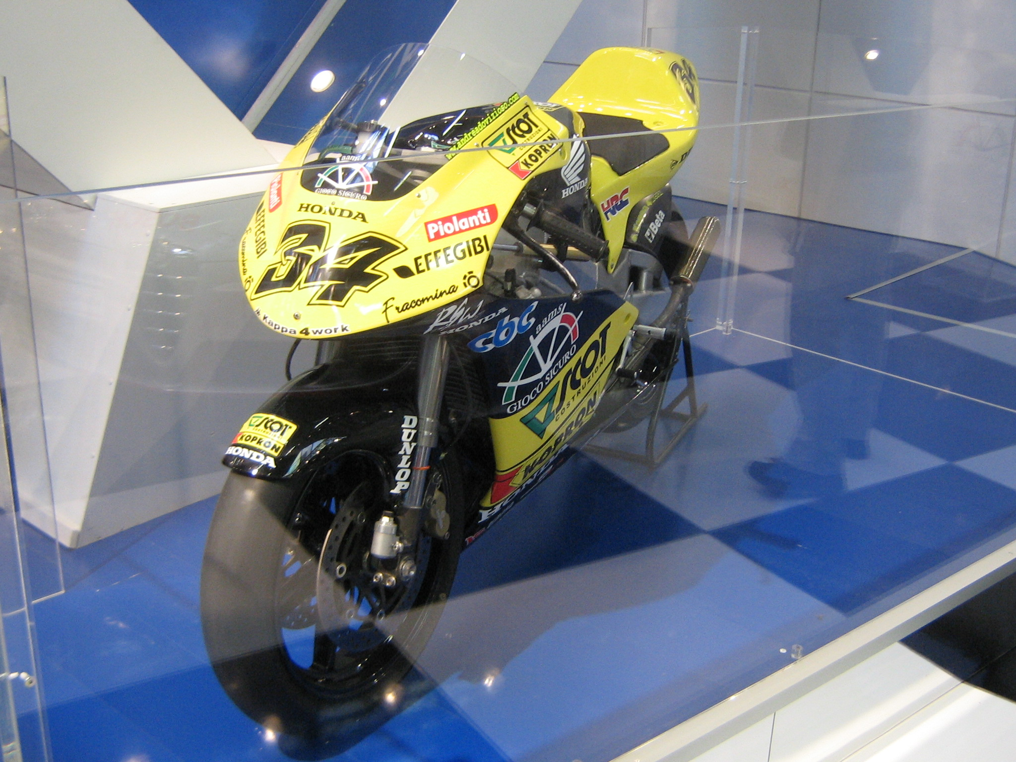 Honda NSR250 di Andrea Dovizioso al Motorshow del 2007